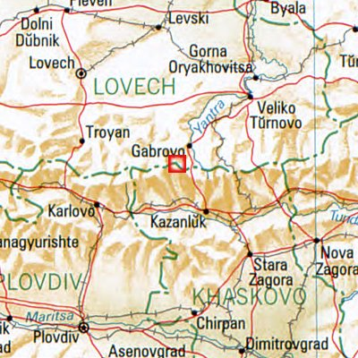 Usana - Lage des Ortes in Bulgarien